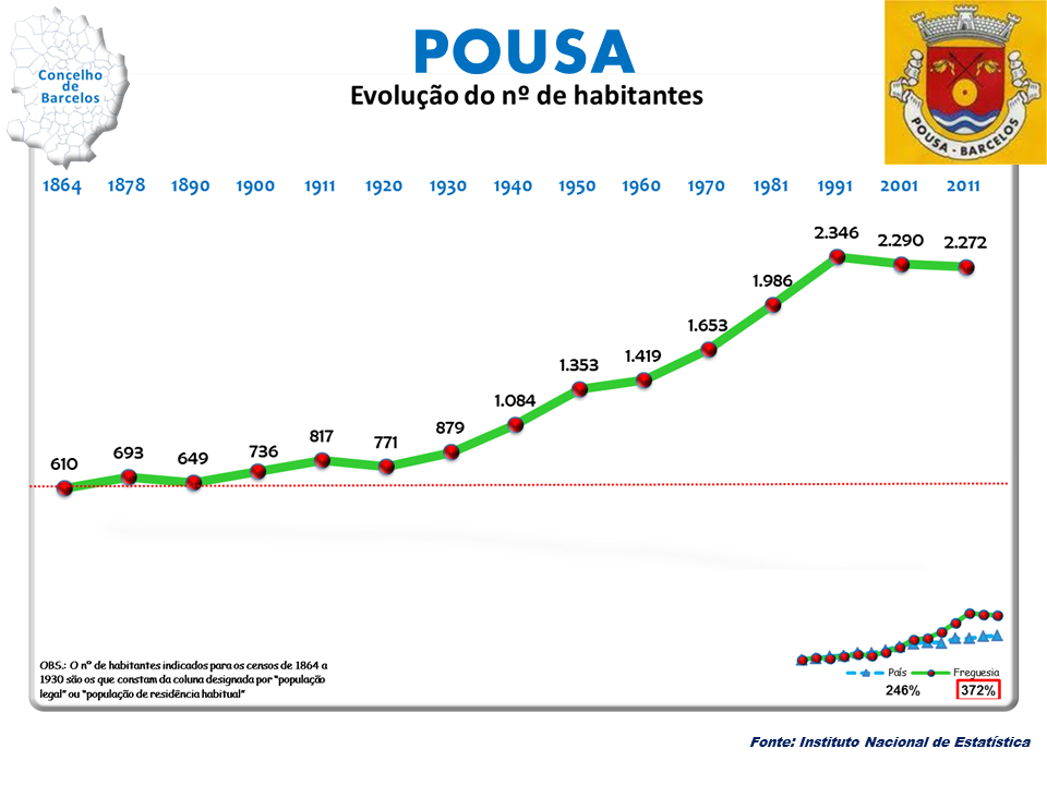 Censo 1864/2011